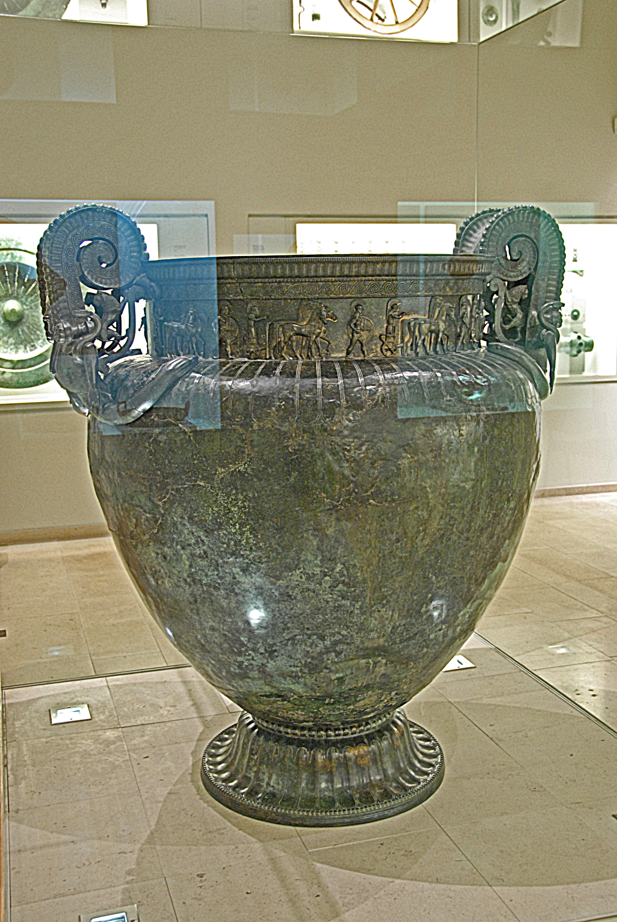 Chatillon, Krater von Vix